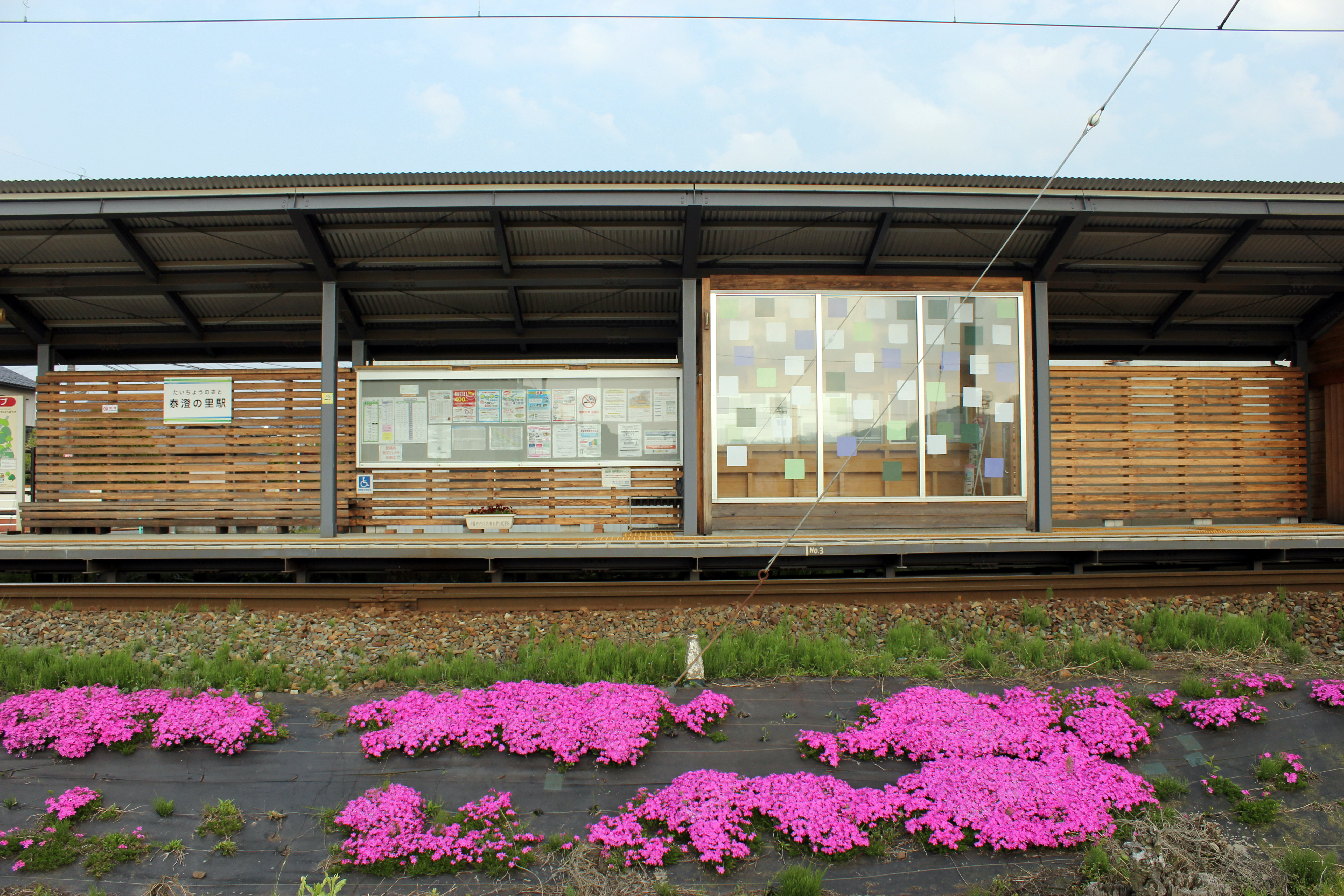 泰澄の里駅（福井鉄道）